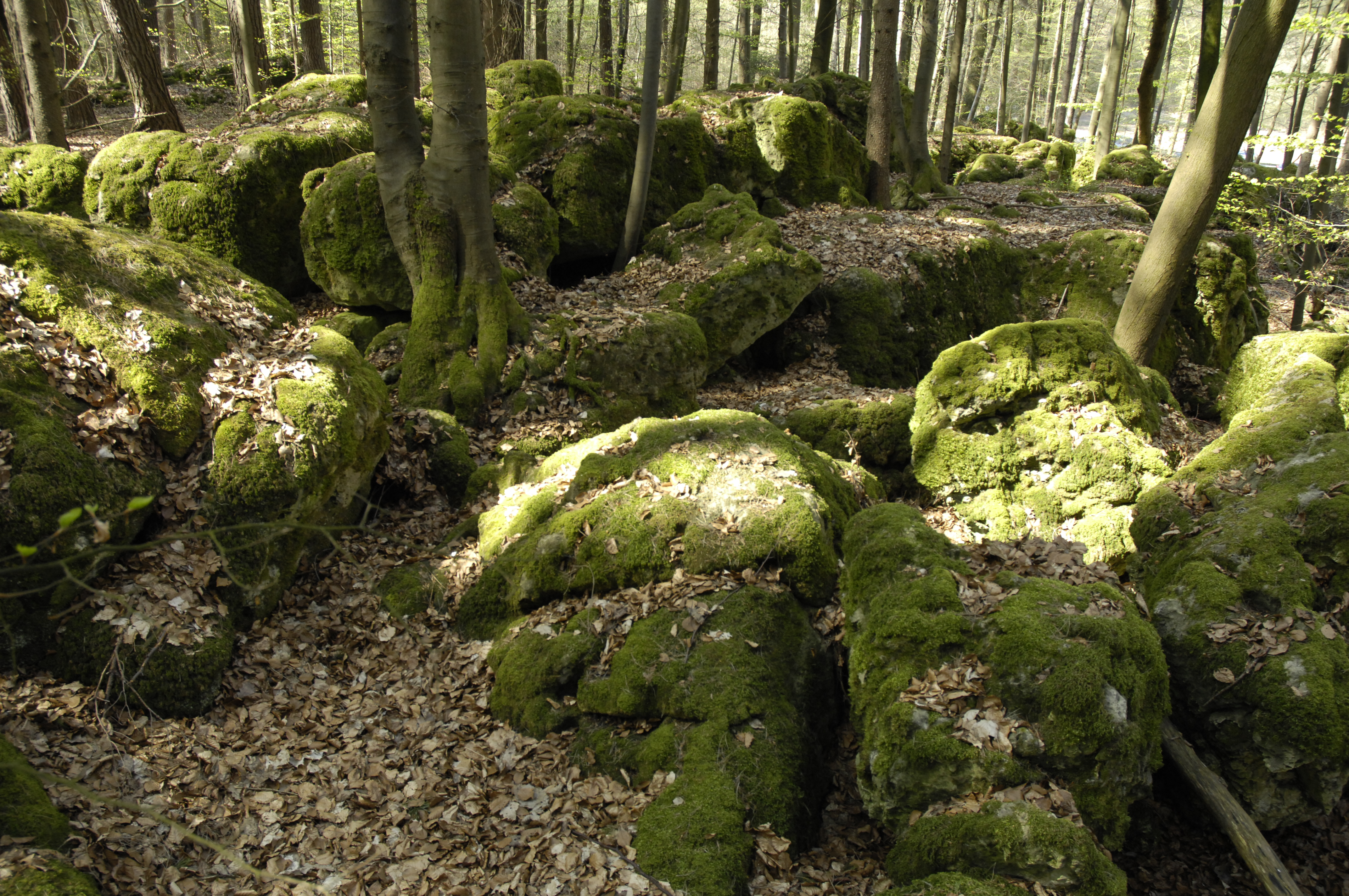 Druidenwald Nähe Gößweinstein, Nähe Wiesenttal, Fränkische Schweiz